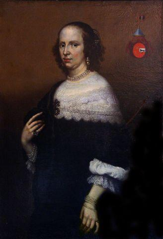 Sophia van Beveren (1611-1682), vrouwe van West-Barendrecht, voogdes van het Arent Maertenshof, moeder van het weeshuis te Dordrecht (1675), echtgenote van Pieter de Rovere